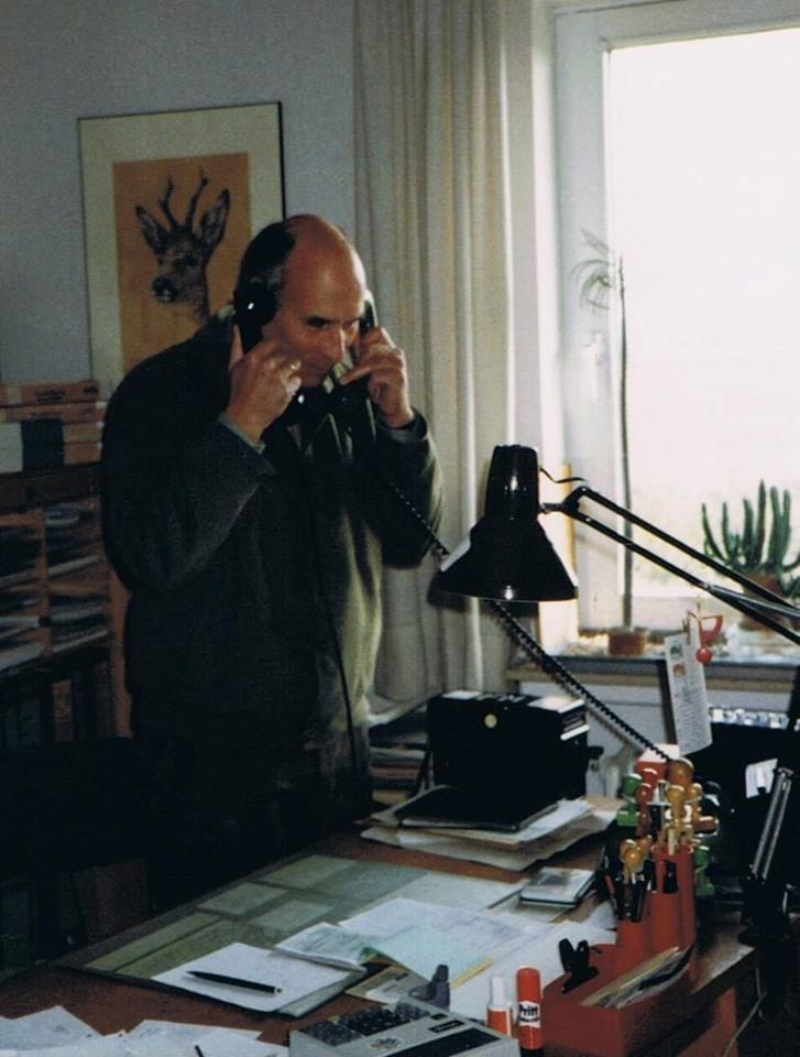 Forstdirektor Günter Nessenius